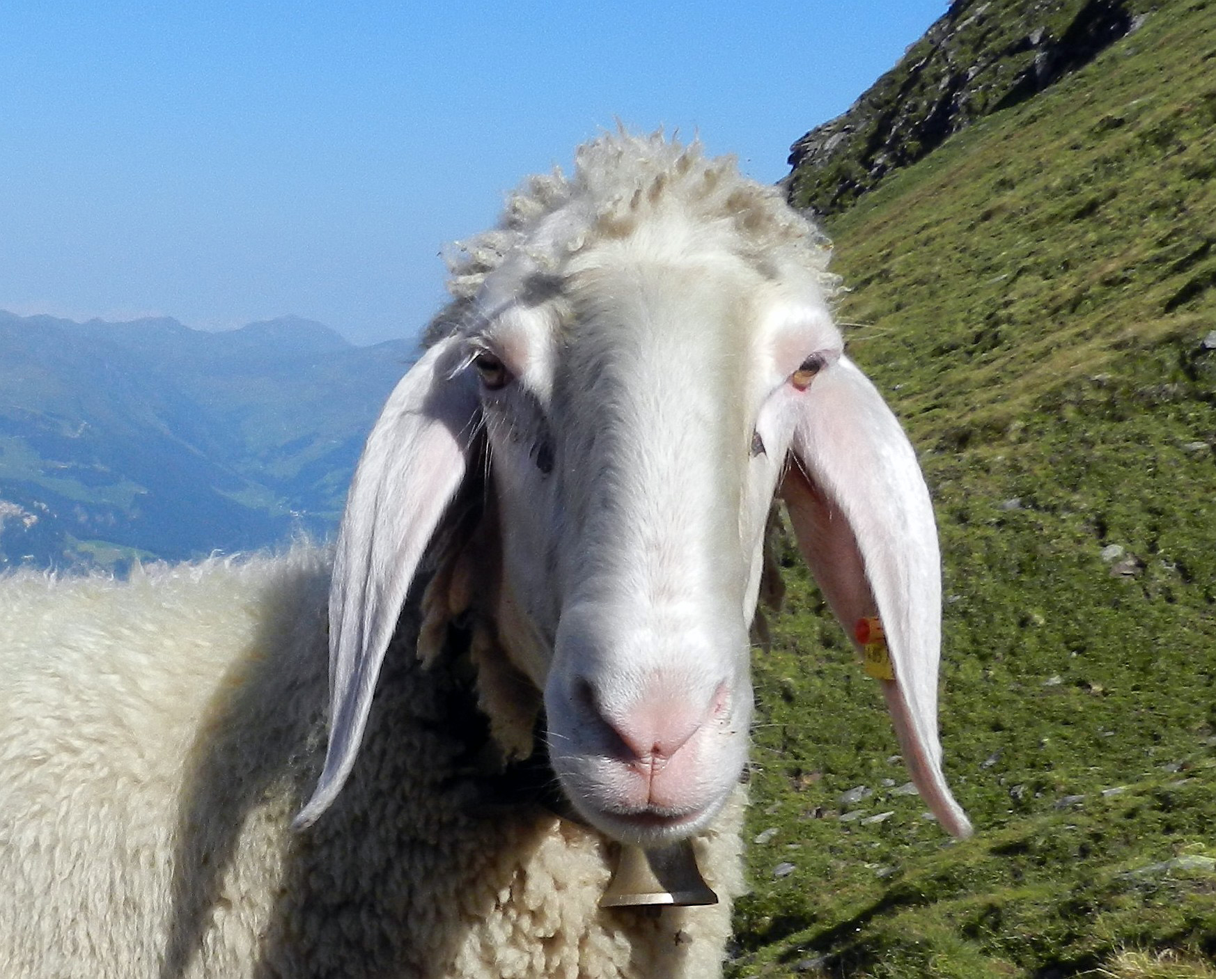 Kopf eines Tiroler Bergschafes. Aufgenommen oberhalb der Karl-von-Edel-Hütte an der Ahornspitze (Zillertaler Alpen, Tirol, Österreich) in einer Höhe von ca. 2400 Metern.